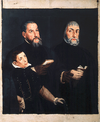 Retratos de Don Diego Caballero y Alonso Caballero con su hijo.label QS:Les,"Retratos de Don Diego Caballero y Alonso Caballero con su hijo."